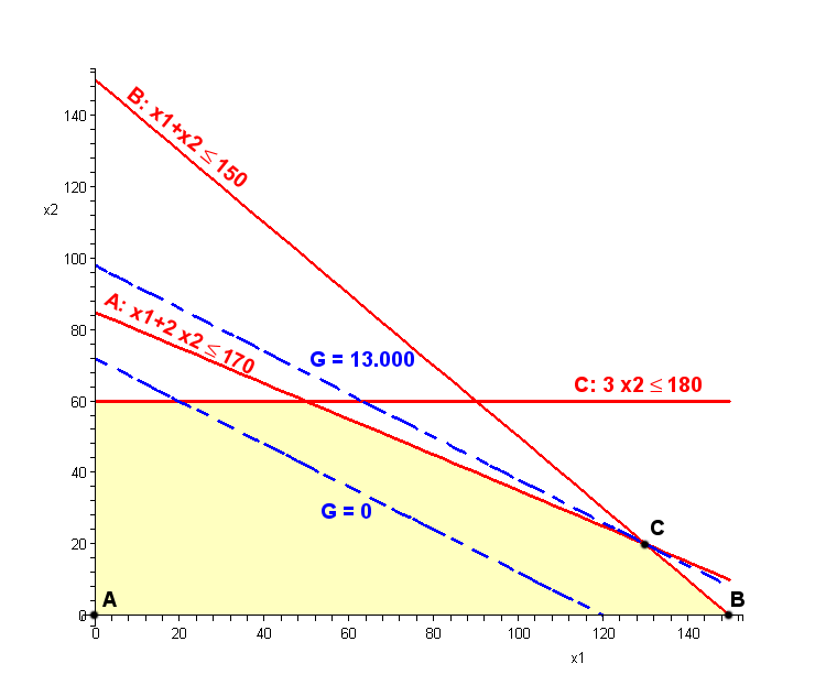 Figuur voor uitleg simplexmethode, eigen werk